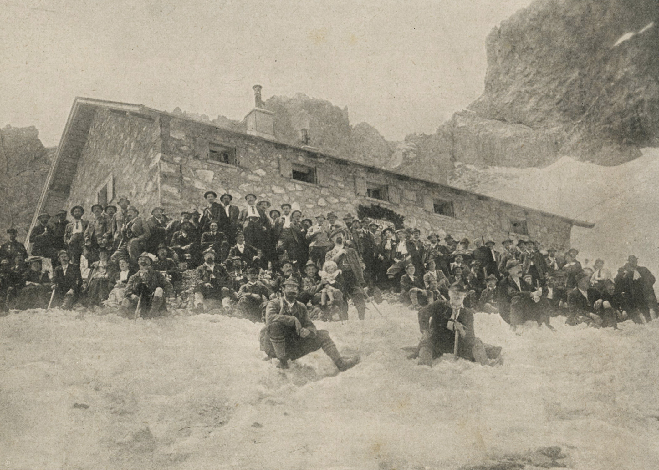 Einweihungsfeier der Lamsenjochhütte der Sektion München des DOeAV am 16. und 17. Juni 1906